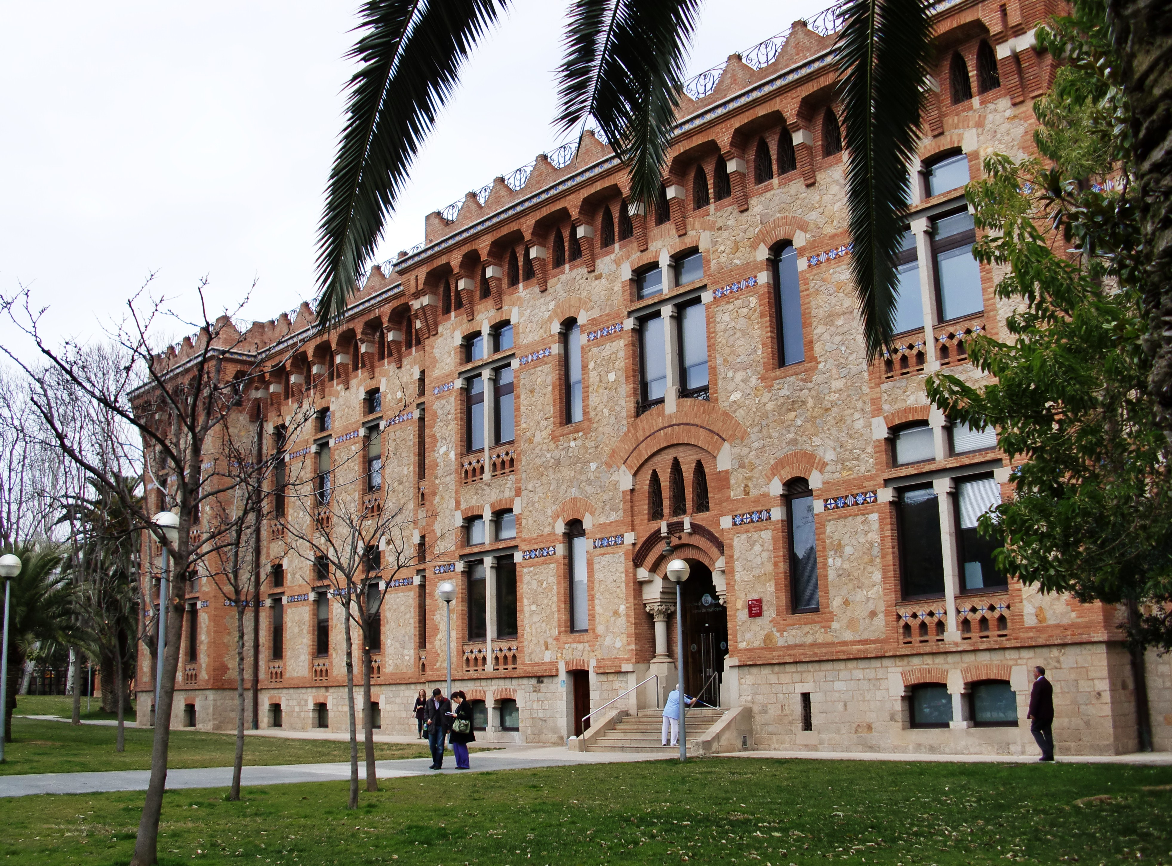 Casa provincial de la Maternitat (Barcelona)